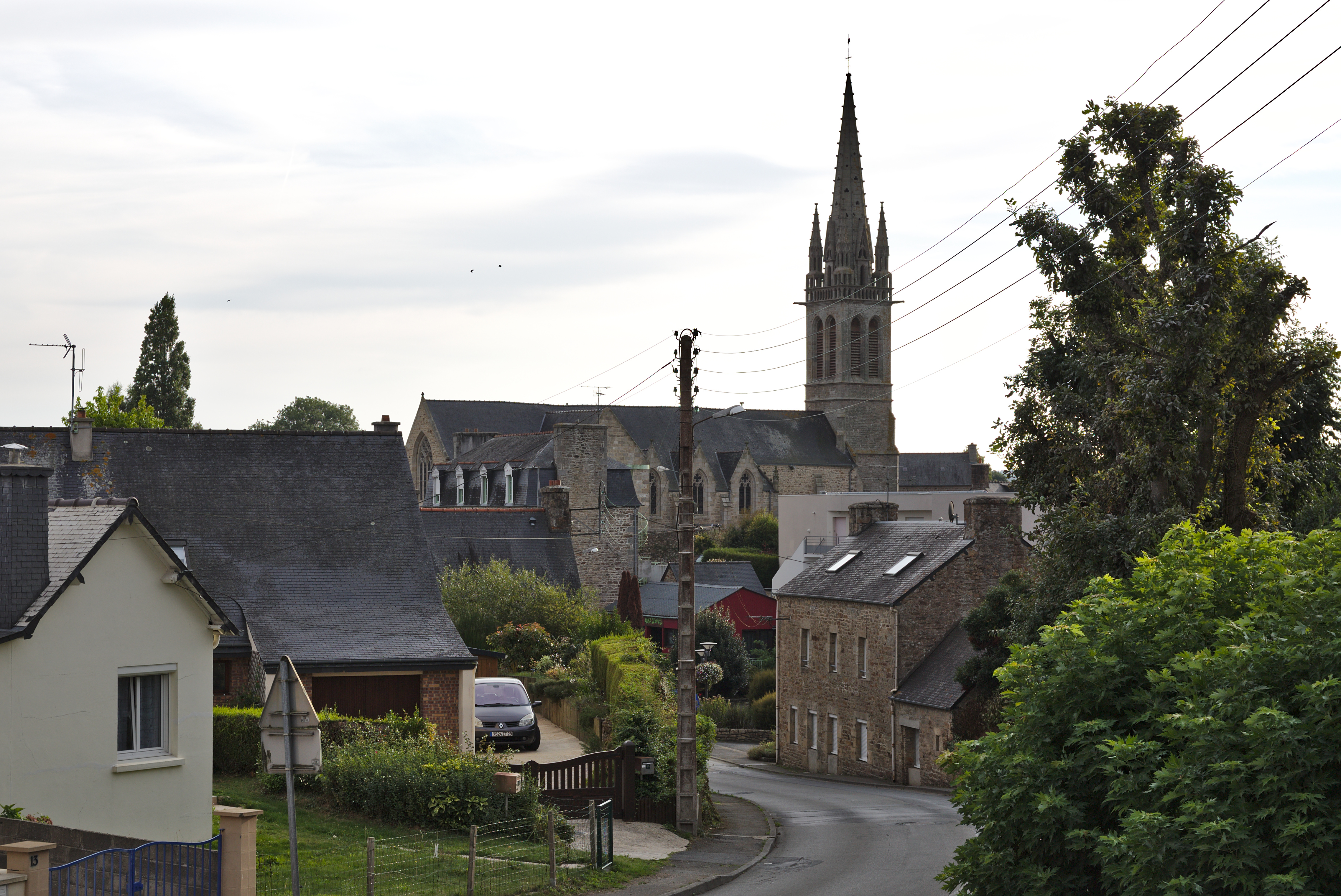 Kreiz-kêr Plouizi.